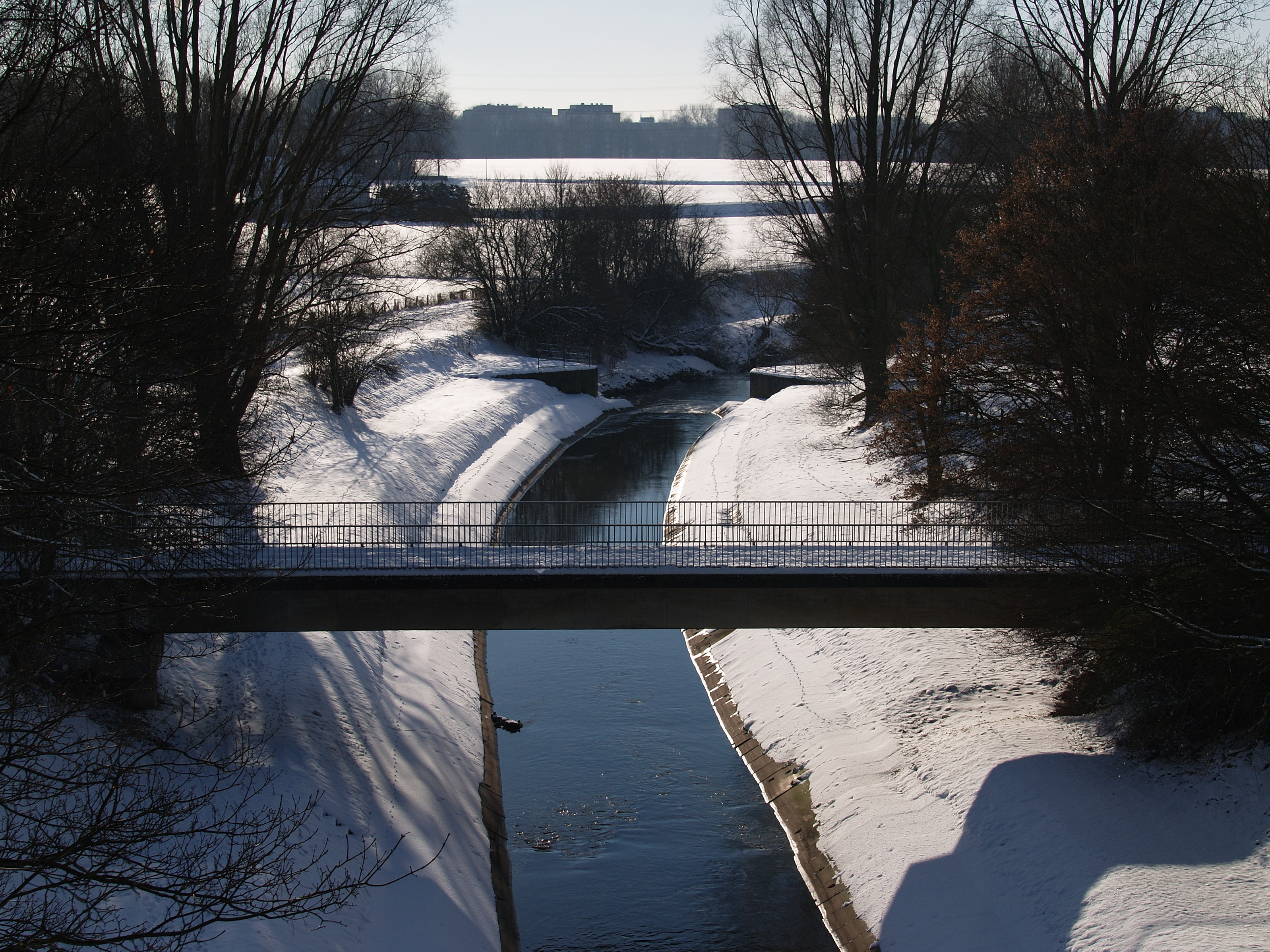 Blick von der Emscherbrücke der König-Ludwig-Trasse nach Westen auf die Emscher